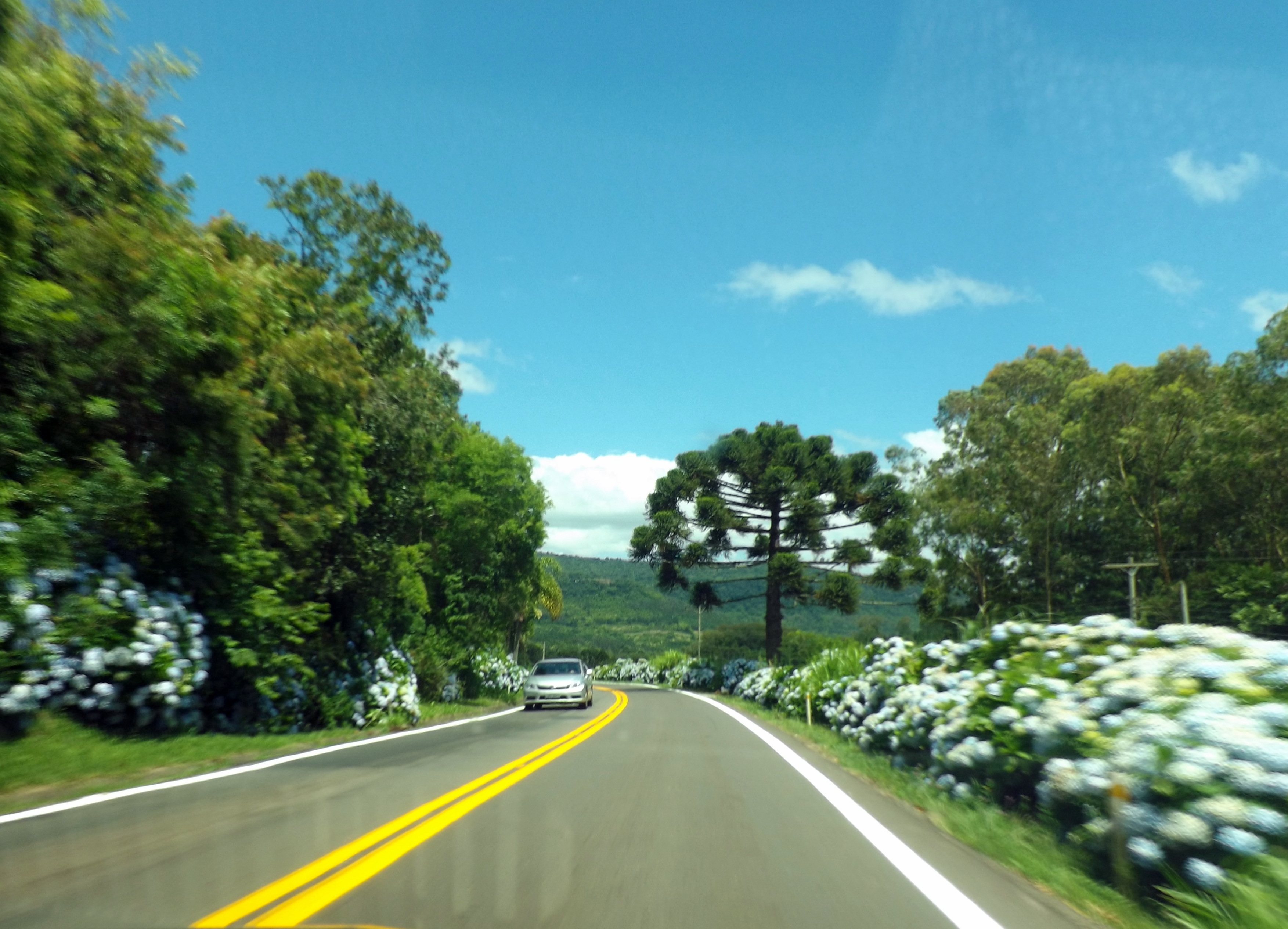 Rota Romantica - Gramado